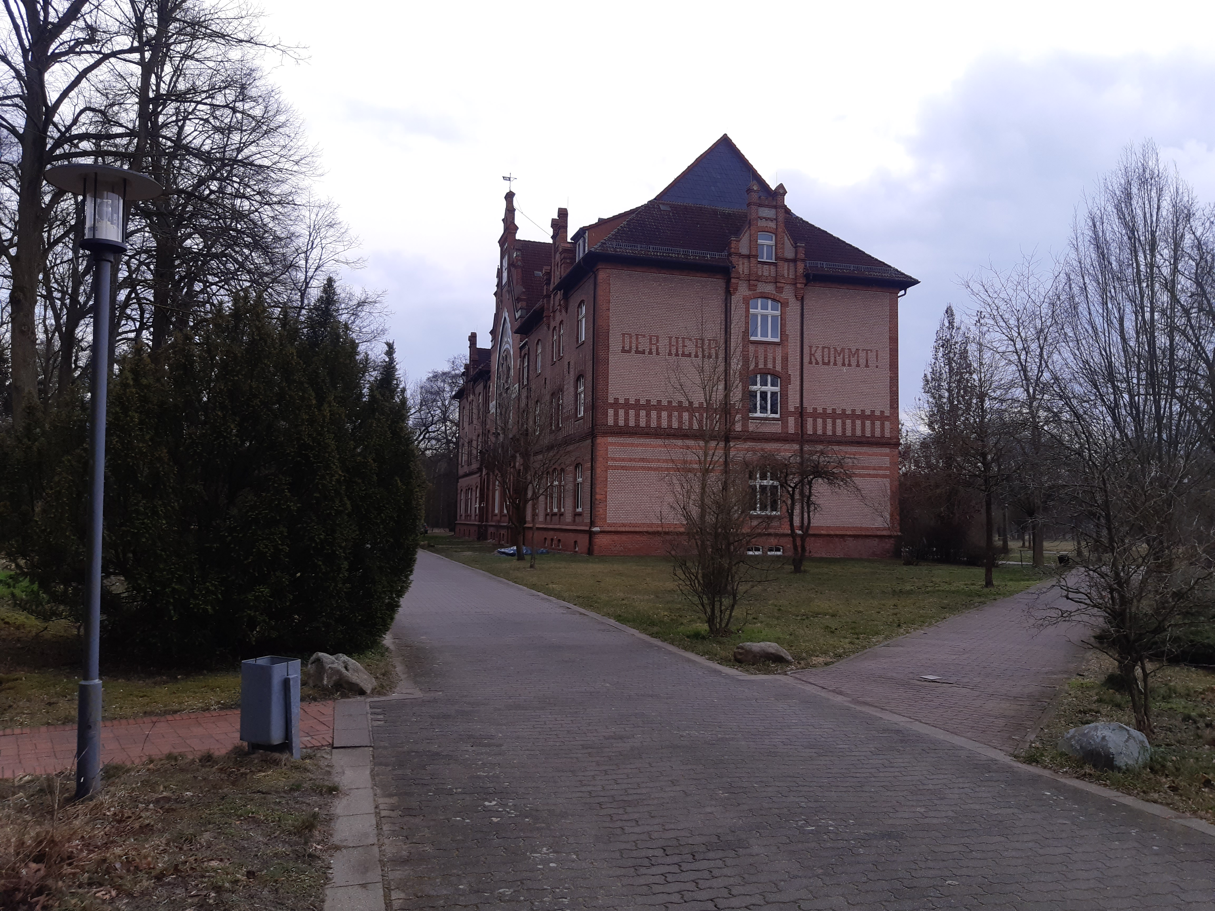 Haus Nr. 5